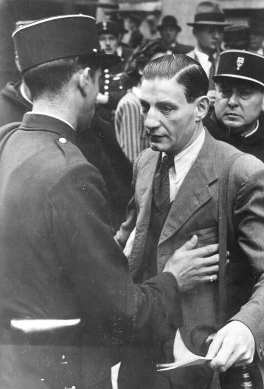 F I d2b4 Frankreich Im besetzten Gebiet. (Frankreich) Festnahme von Juden in Paris.- Arrestation de Juifs dans Paris en août 1941 par la Police française Durchsuchung der Festgenommenen. PK.-Aufnahme: Kriegsberichter: Wisch (Sch) 8281-41 Aug. 41